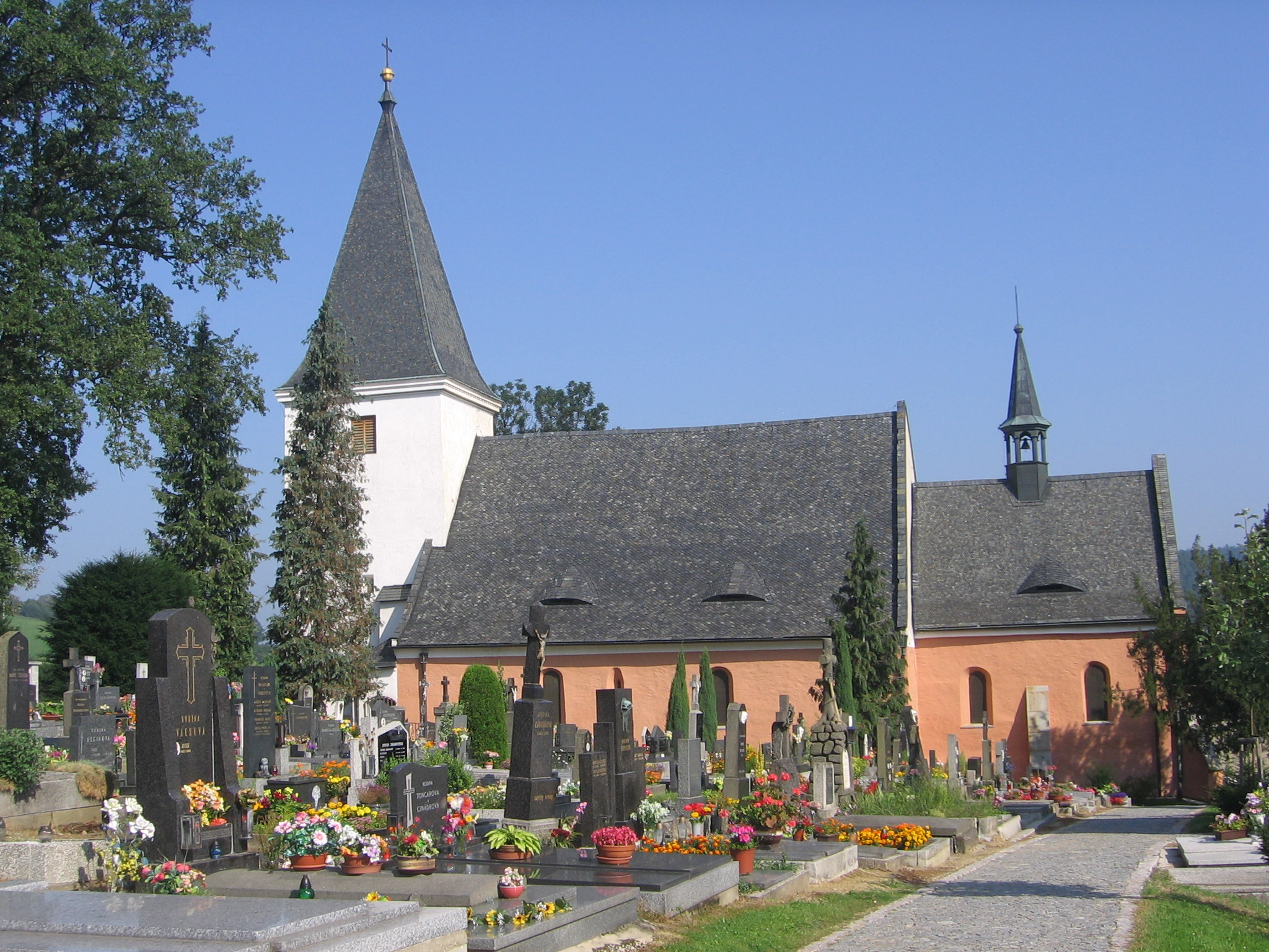 Hřbitovní kostel sv. Petra a Pavla v Prachaticích